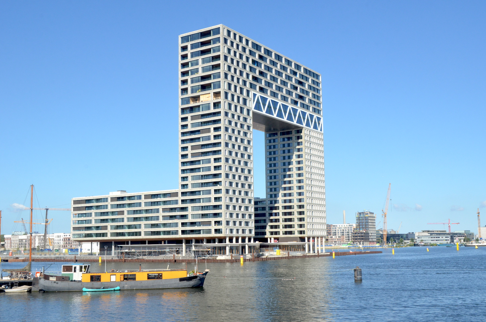 Pontsteigergebouw, kort na de voltooiing in juli 2018. Foto: Erik Swierstra.